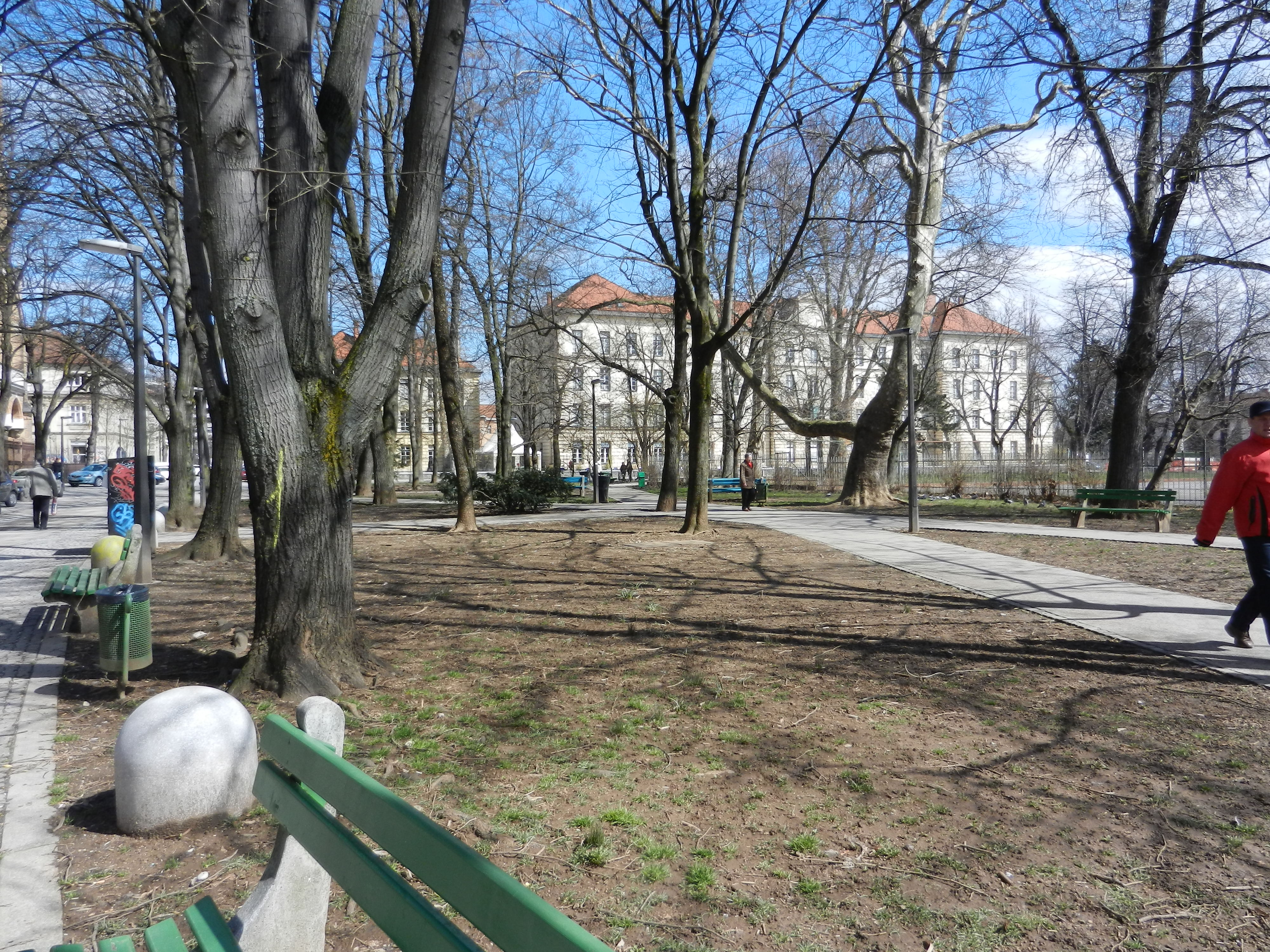 Park Tabor v Ljubljani